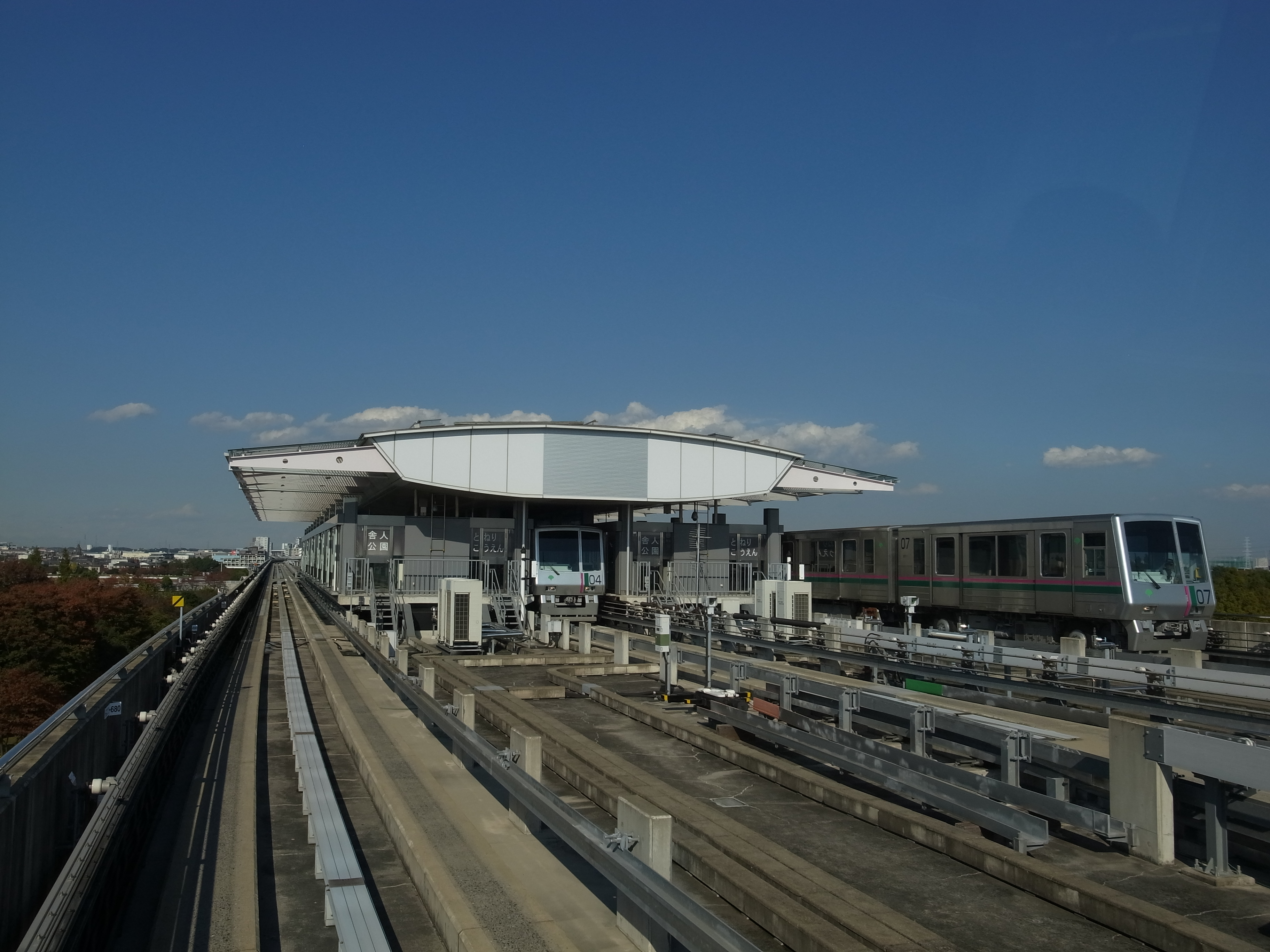 Toneri-kōen Station (舎人公園駅)